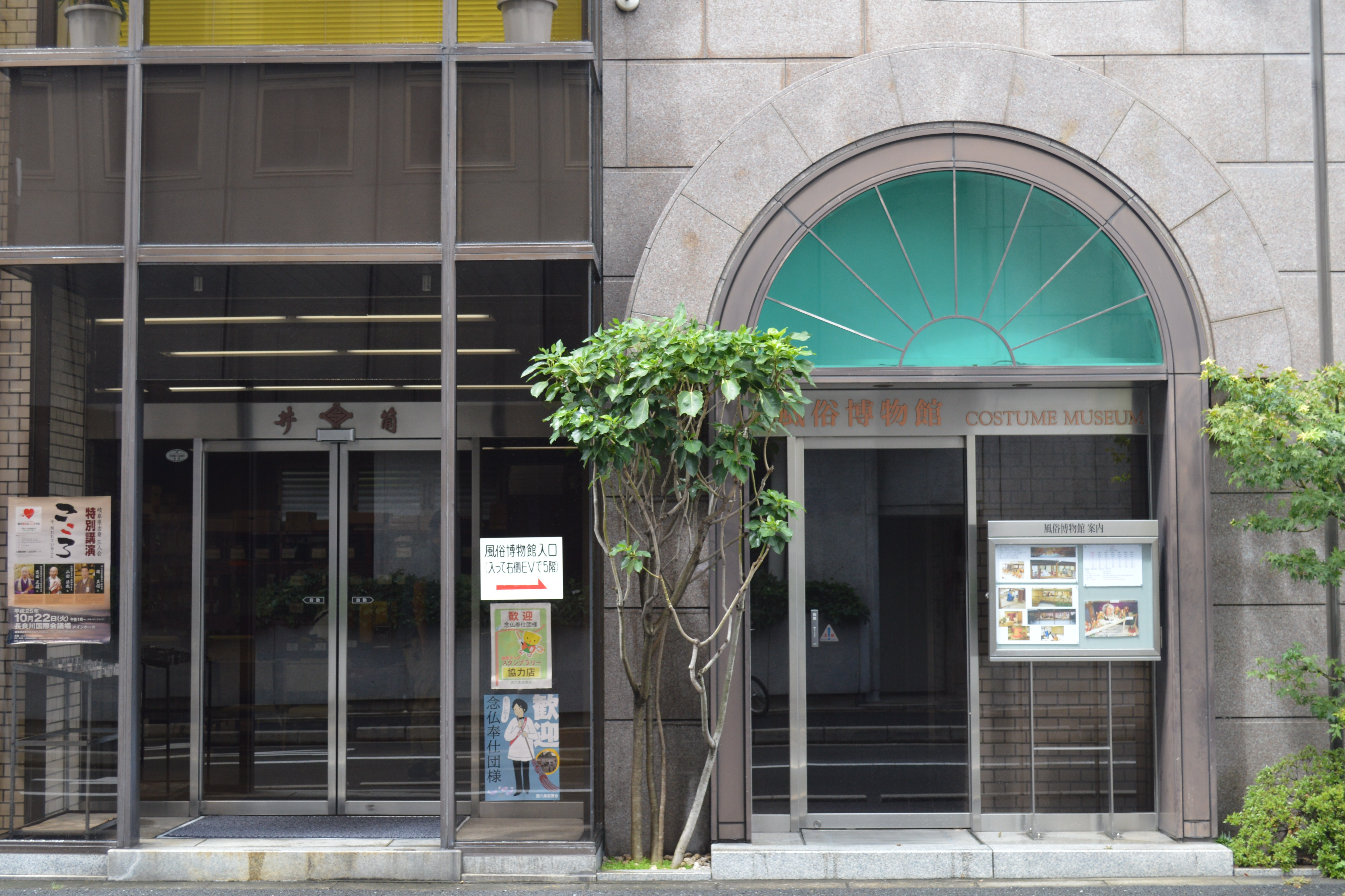 京都市下京区にある風俗博物館